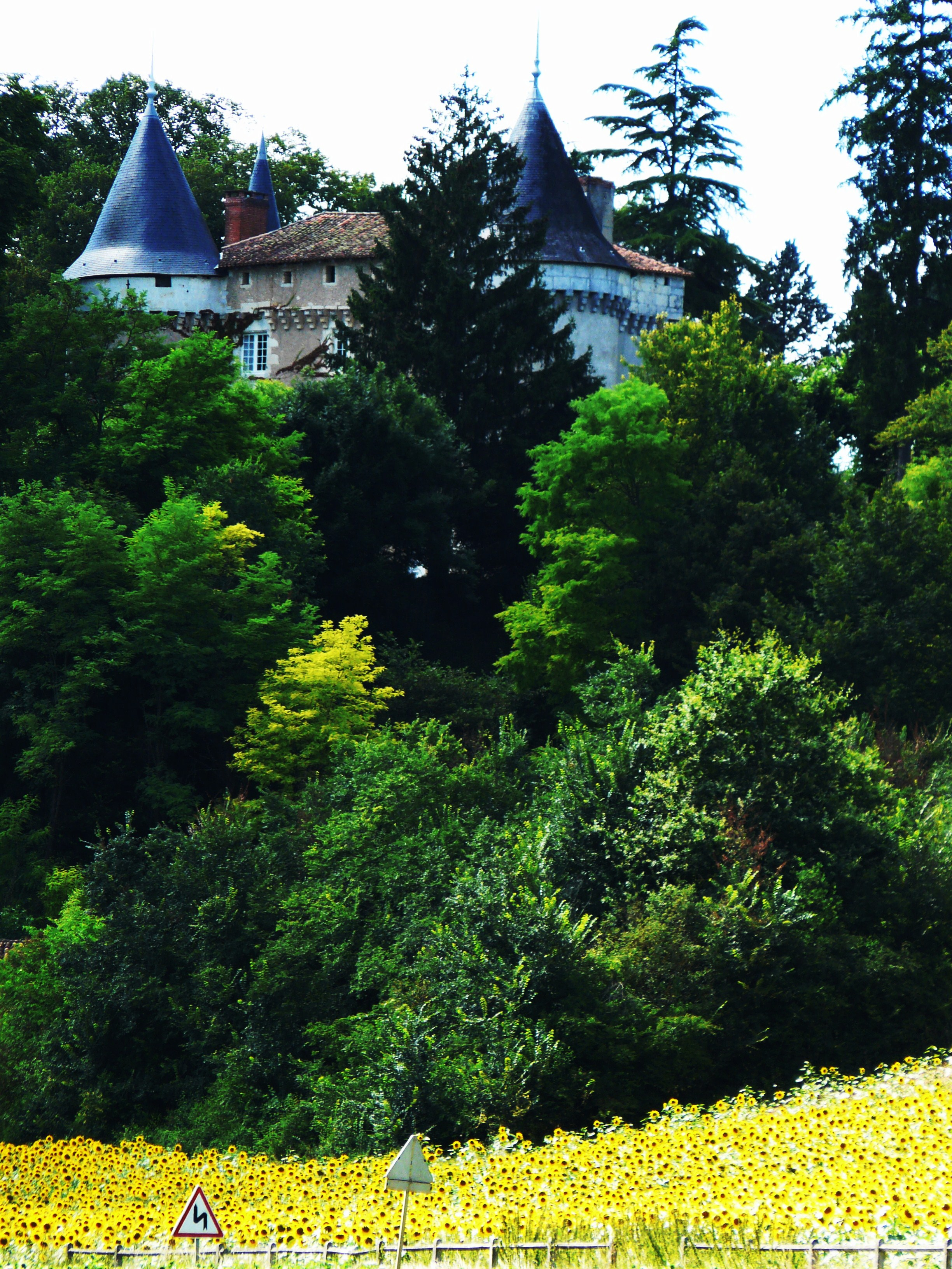 Le château de Trigonant à Antonne-et-Trigonant, Dordogne, France